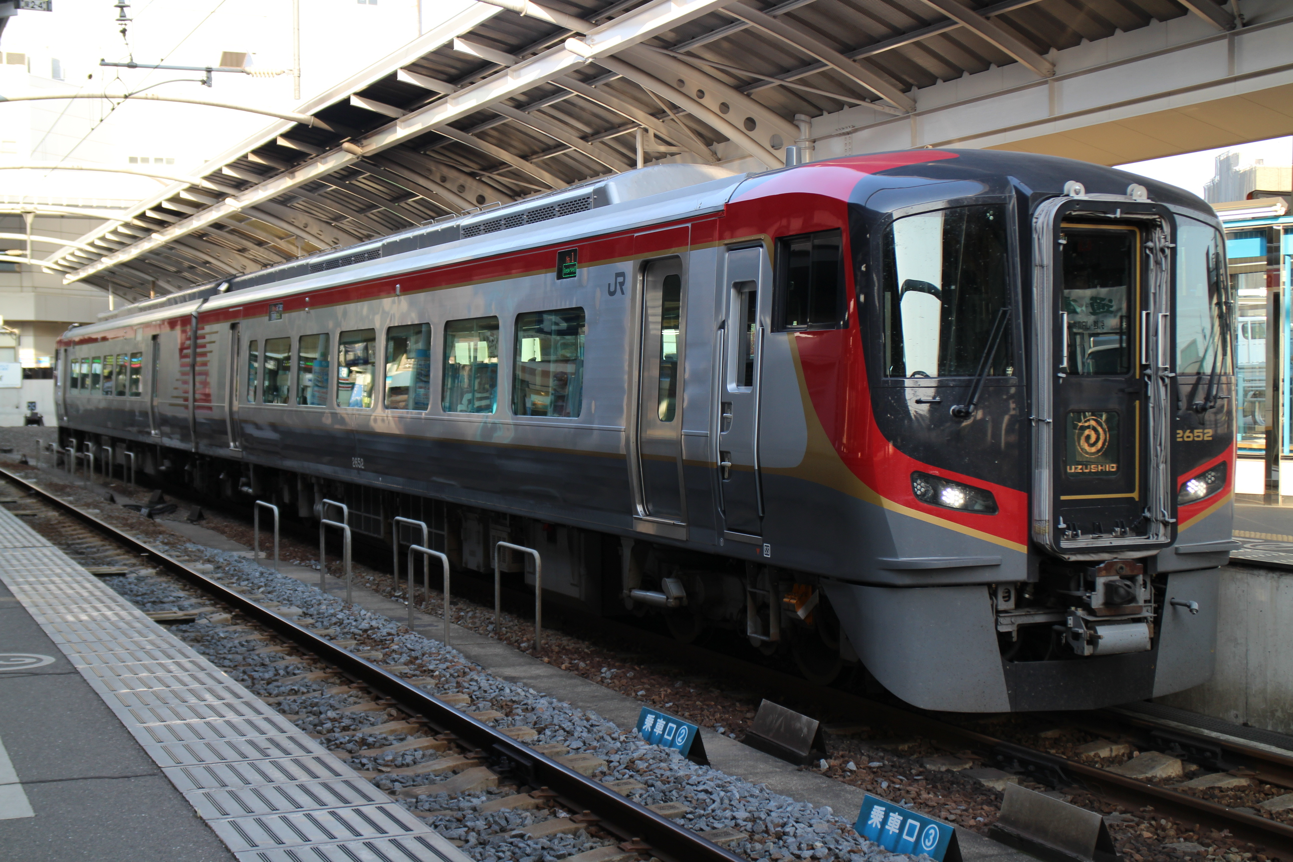 JR四国 2600系特急型気動車